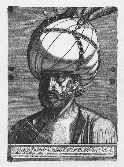 Kanuni